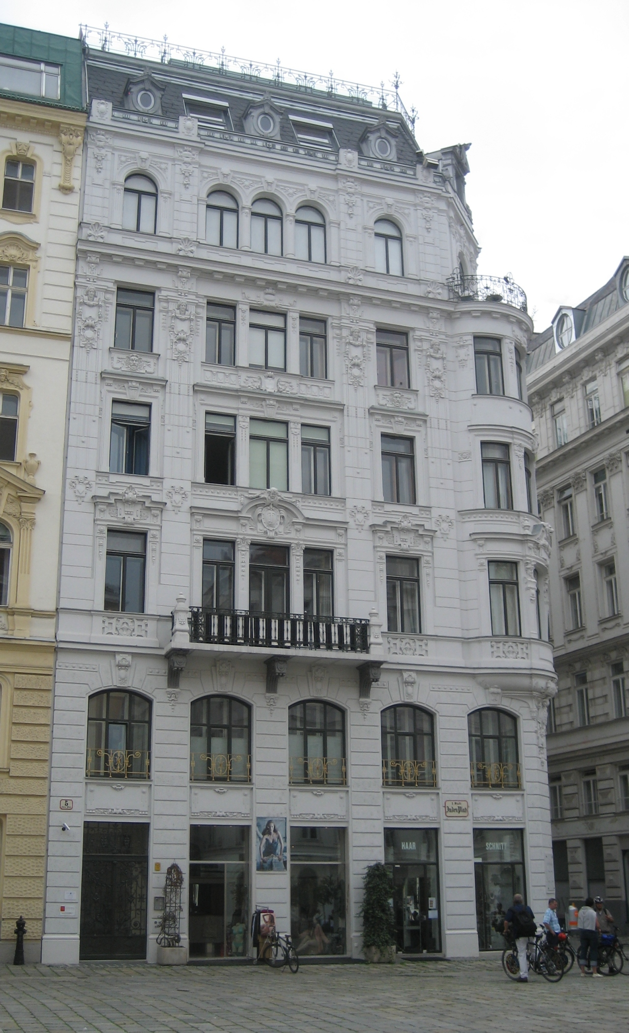 das Haus Judenplatz 5 im 1. Bezirk, in Wien